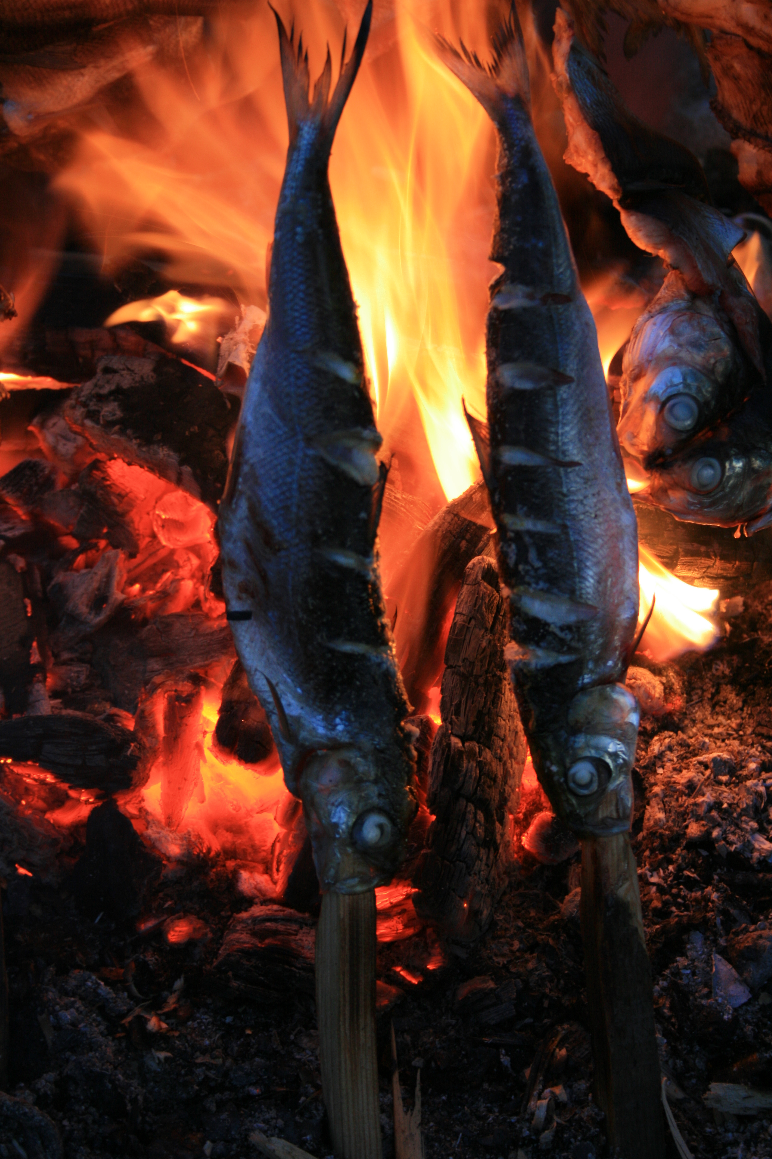 Байкальский омуль на рожне Чивыркуйский залив Байкала (Бурятия)